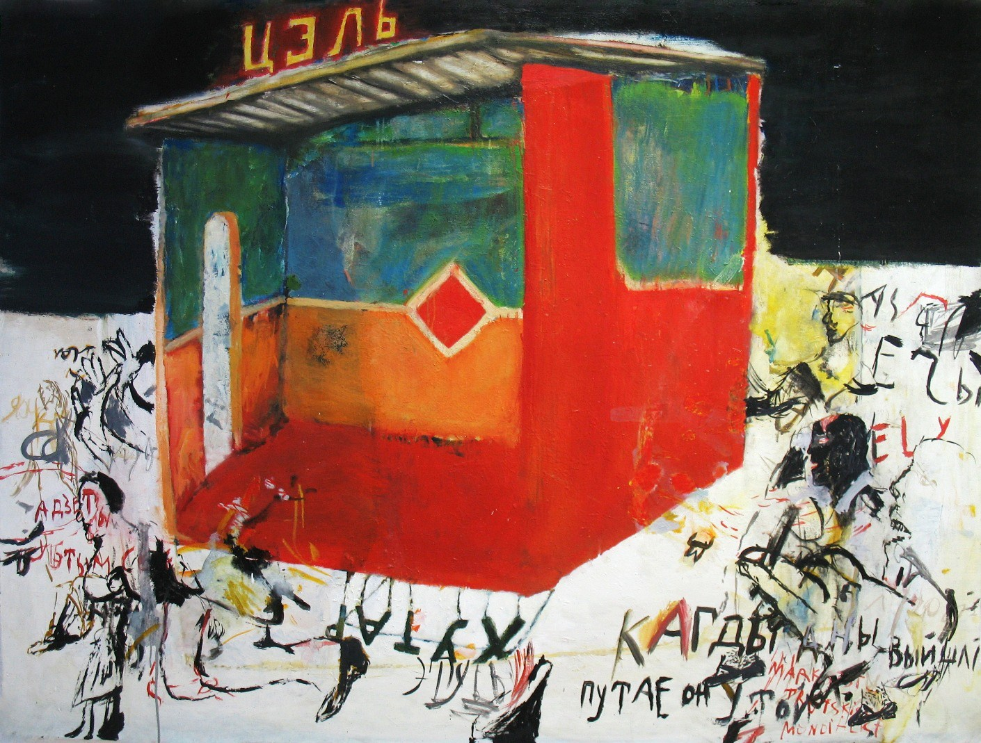 Художник Игорь Тишин. "Автобусная остановка", 150x200